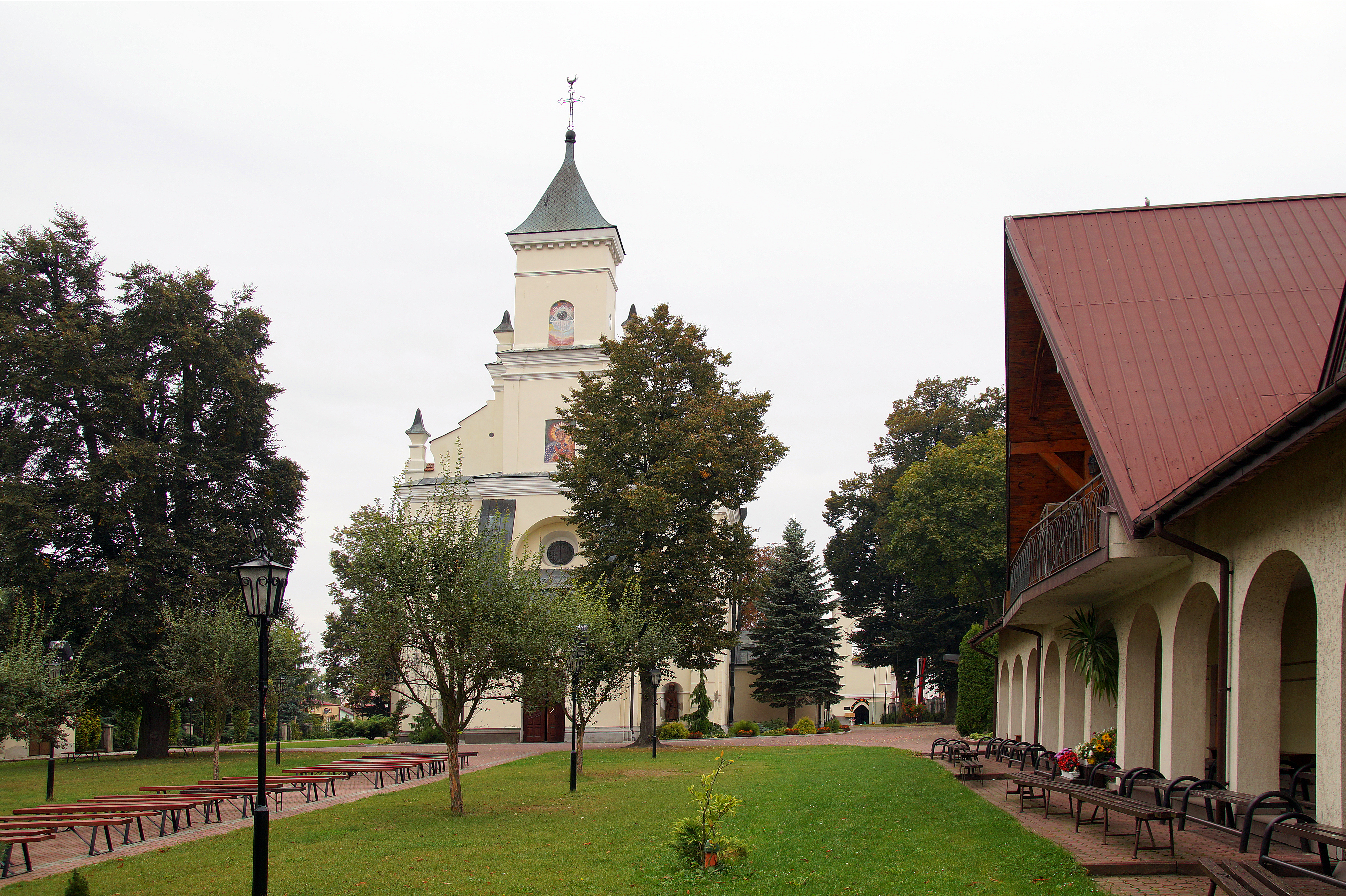 Bełżyce, kościół par. p.w. Nawrócenia św. Pawła, XVII, XIX